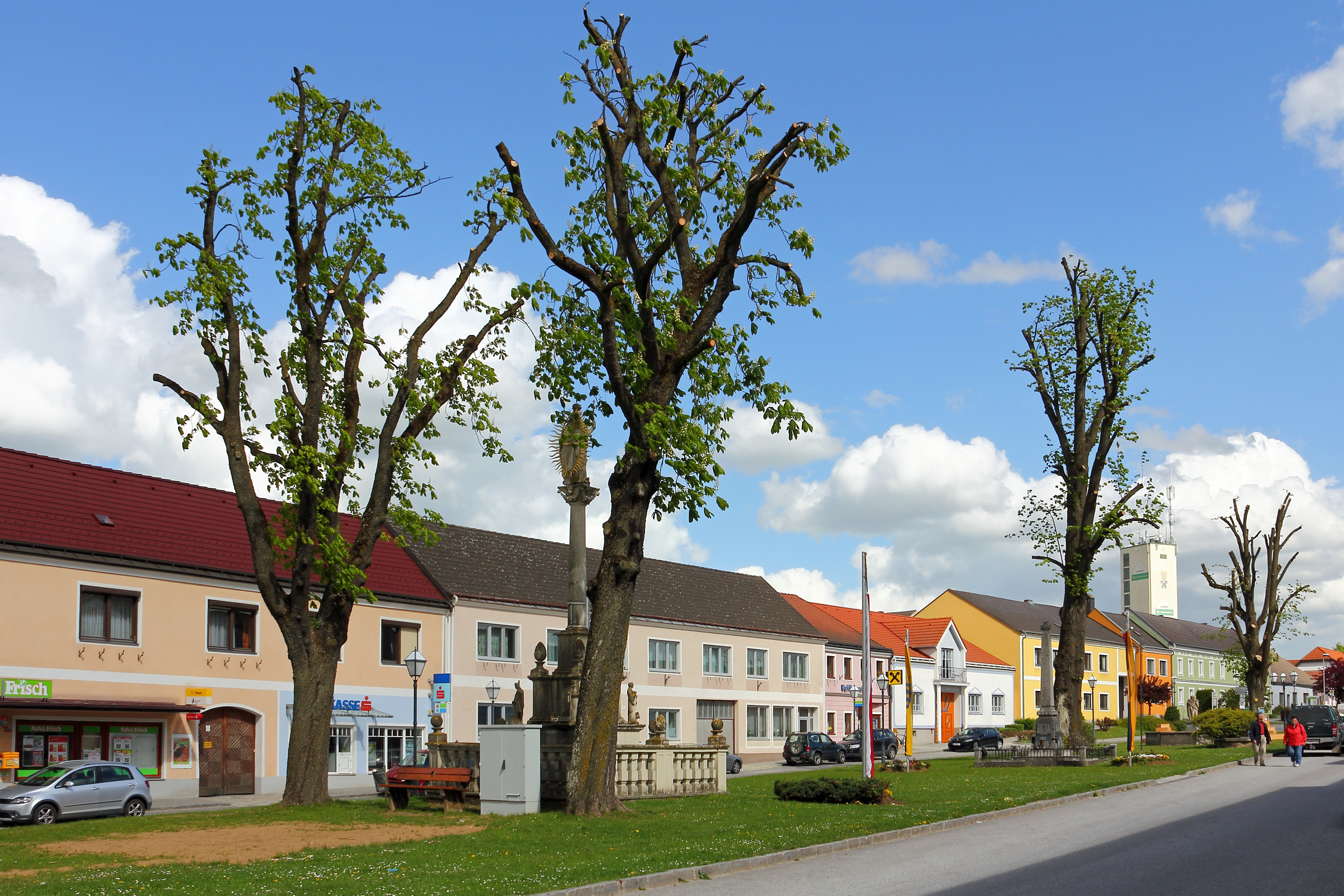 Die Baumgruppe am Hauptplatz von Schweiggers besteht aus 5 Linden und 2 Kastanienbäumen und wurde 1957 zum Naturdenkmal erklärt. This media shows the natural monument in Lower Austria with the ID ZT-051.